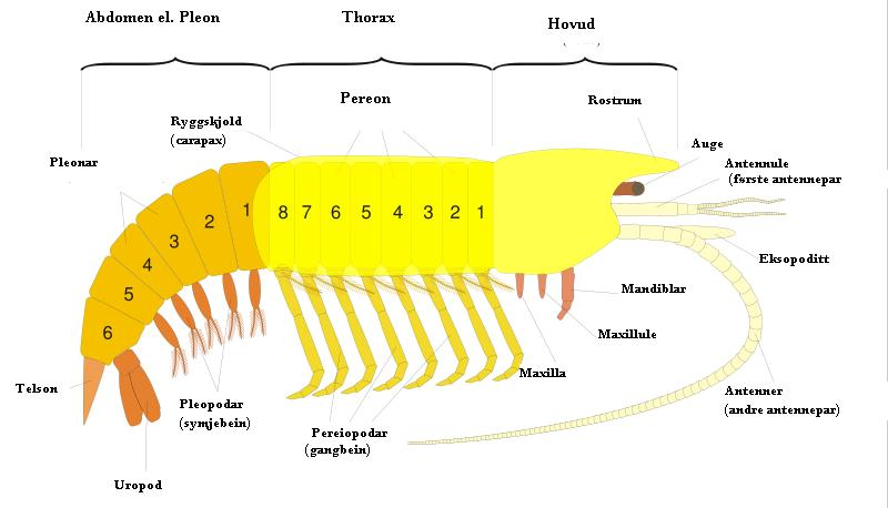 Kroppsplanet til ein storkreps (klikk på biletet for større versjon).